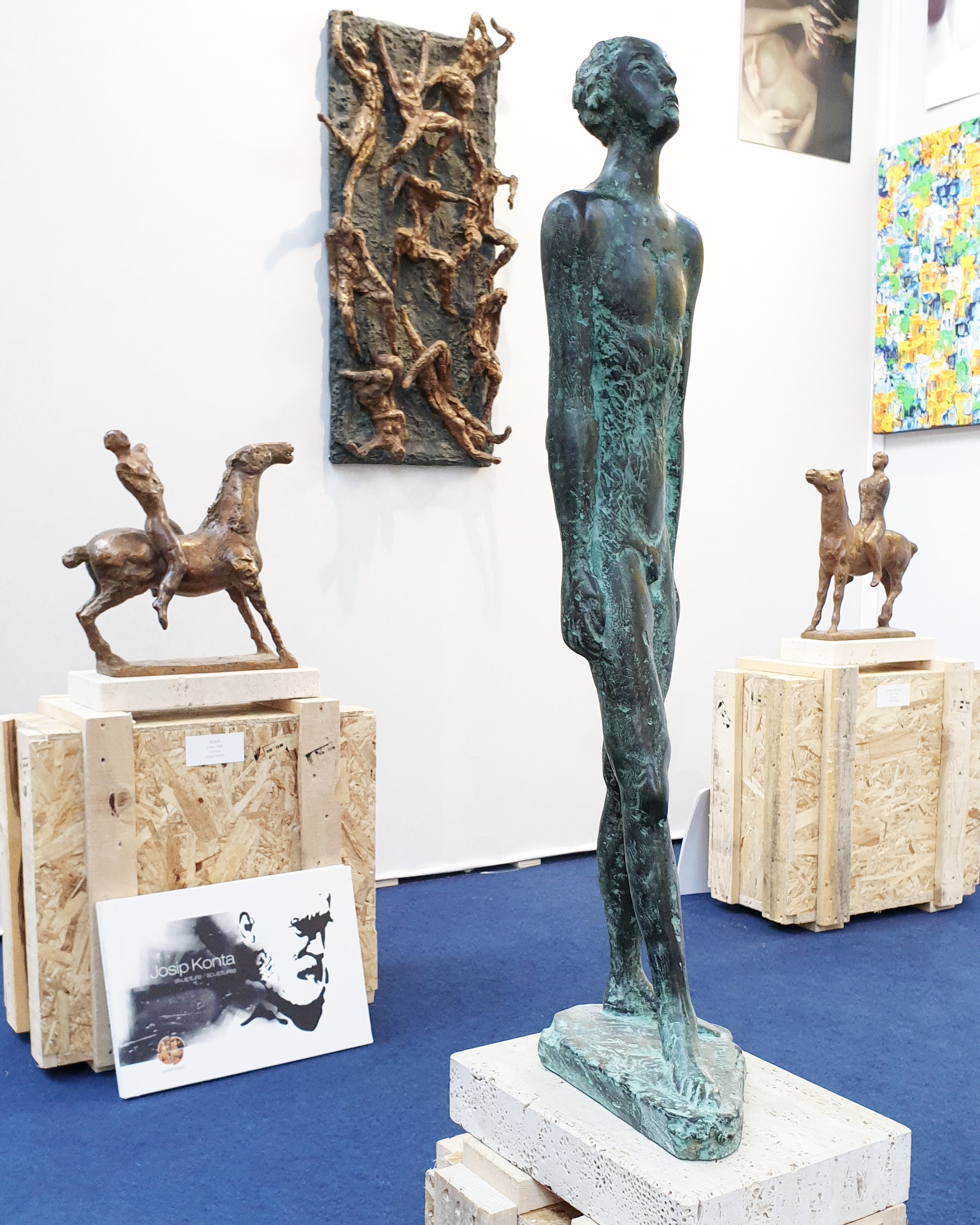 P/CAS sajam umjetnosti 2018, Carreau Du Temple, Pariz, Francuska